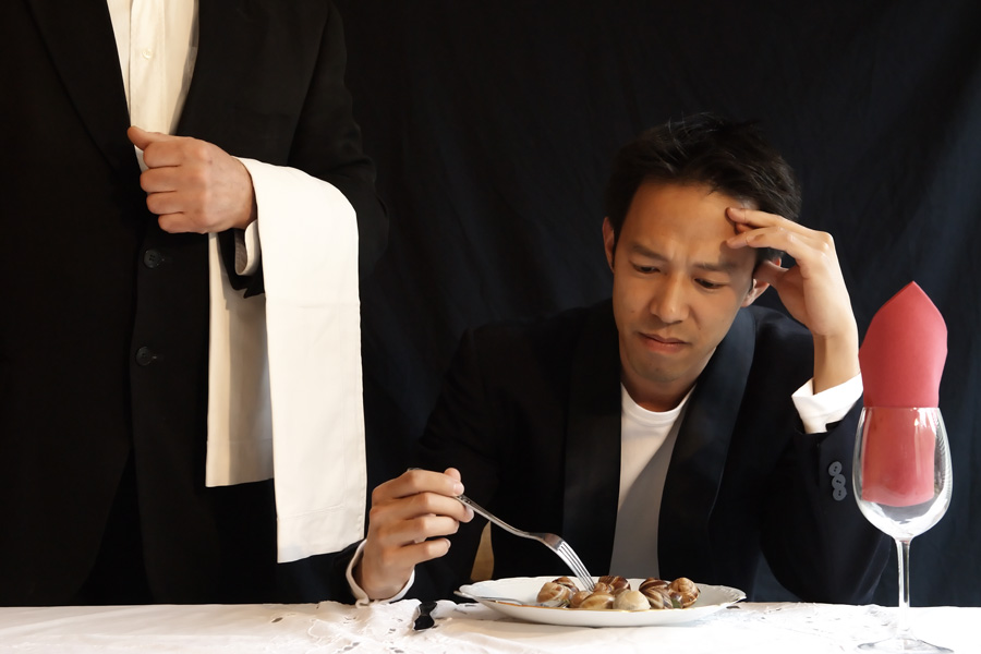 Portrait